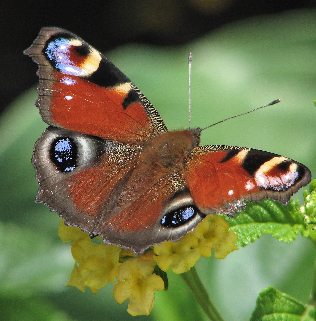 Beschreibung: Tagpfauenauge (Inachis io) / peacock Fotograf: Darkone, 4. August 2005